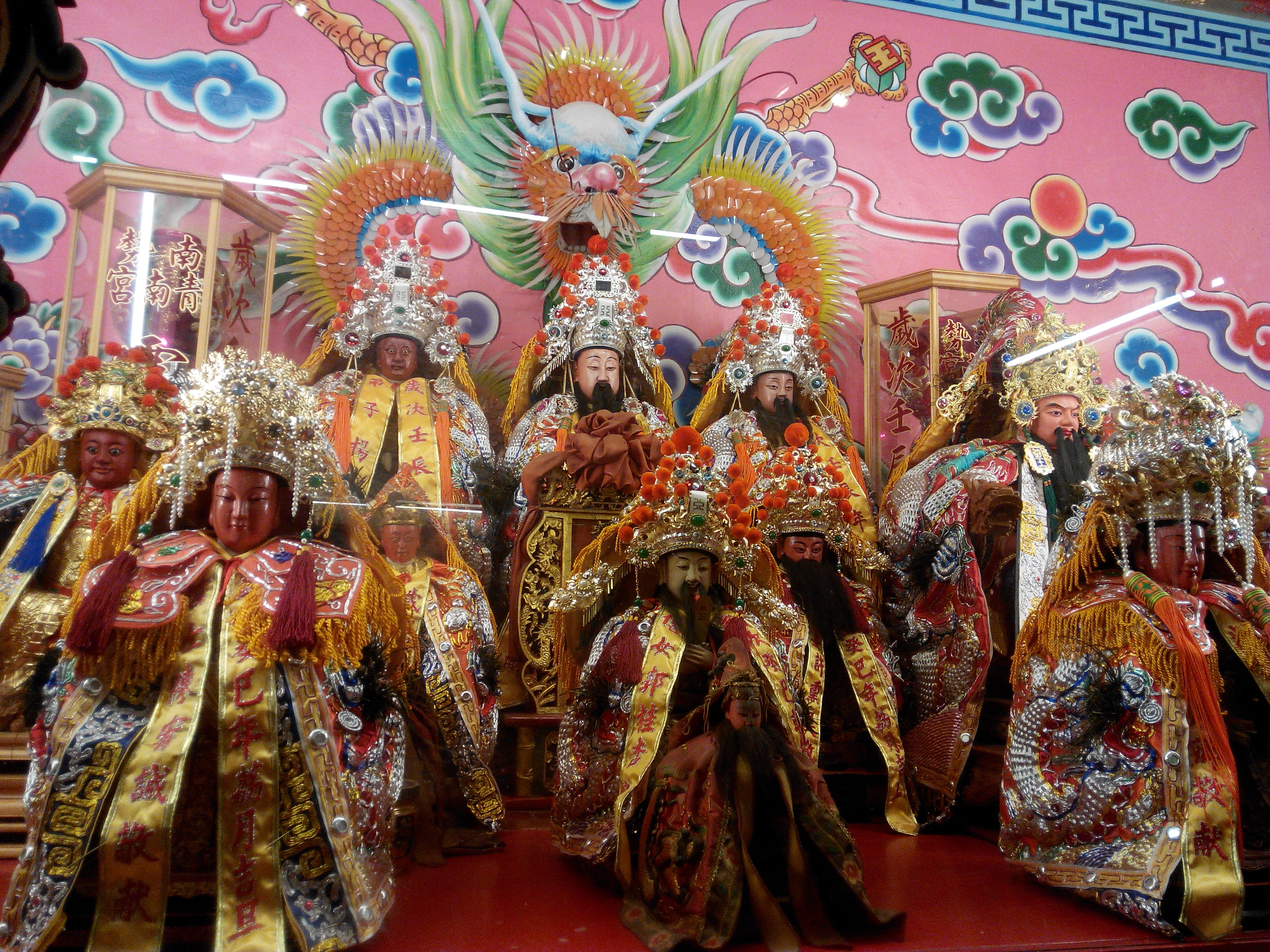 中文（台灣）: 新竹南勢青南宮 — 神龕一景